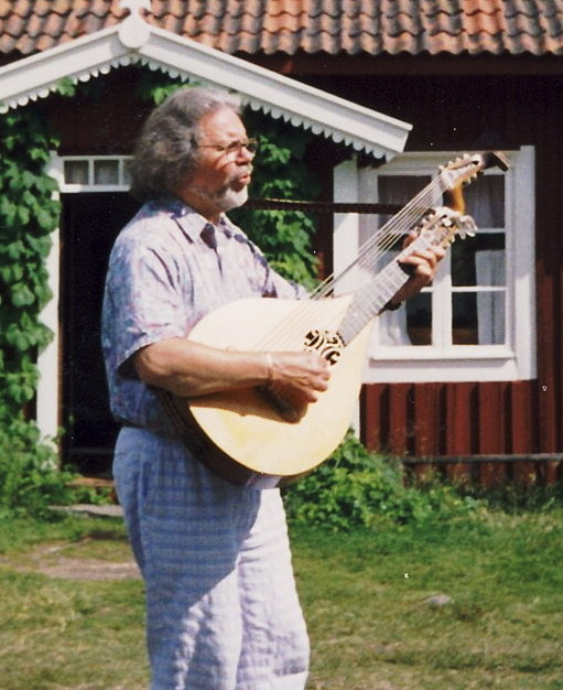 Nisse Munck utanför Luossastugan, Skattlösberg, Dalarna